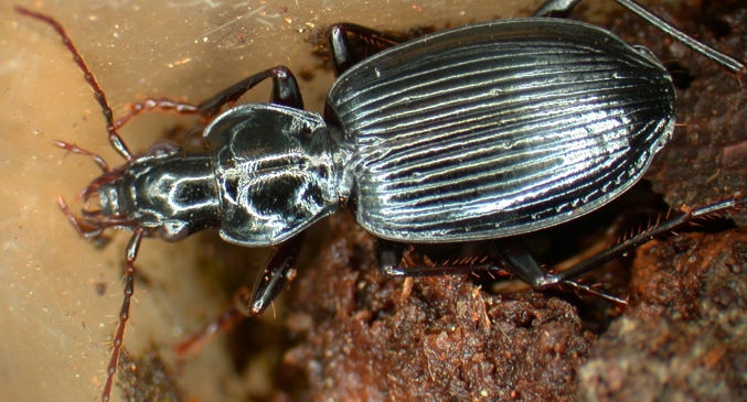 Platynus ovipennis